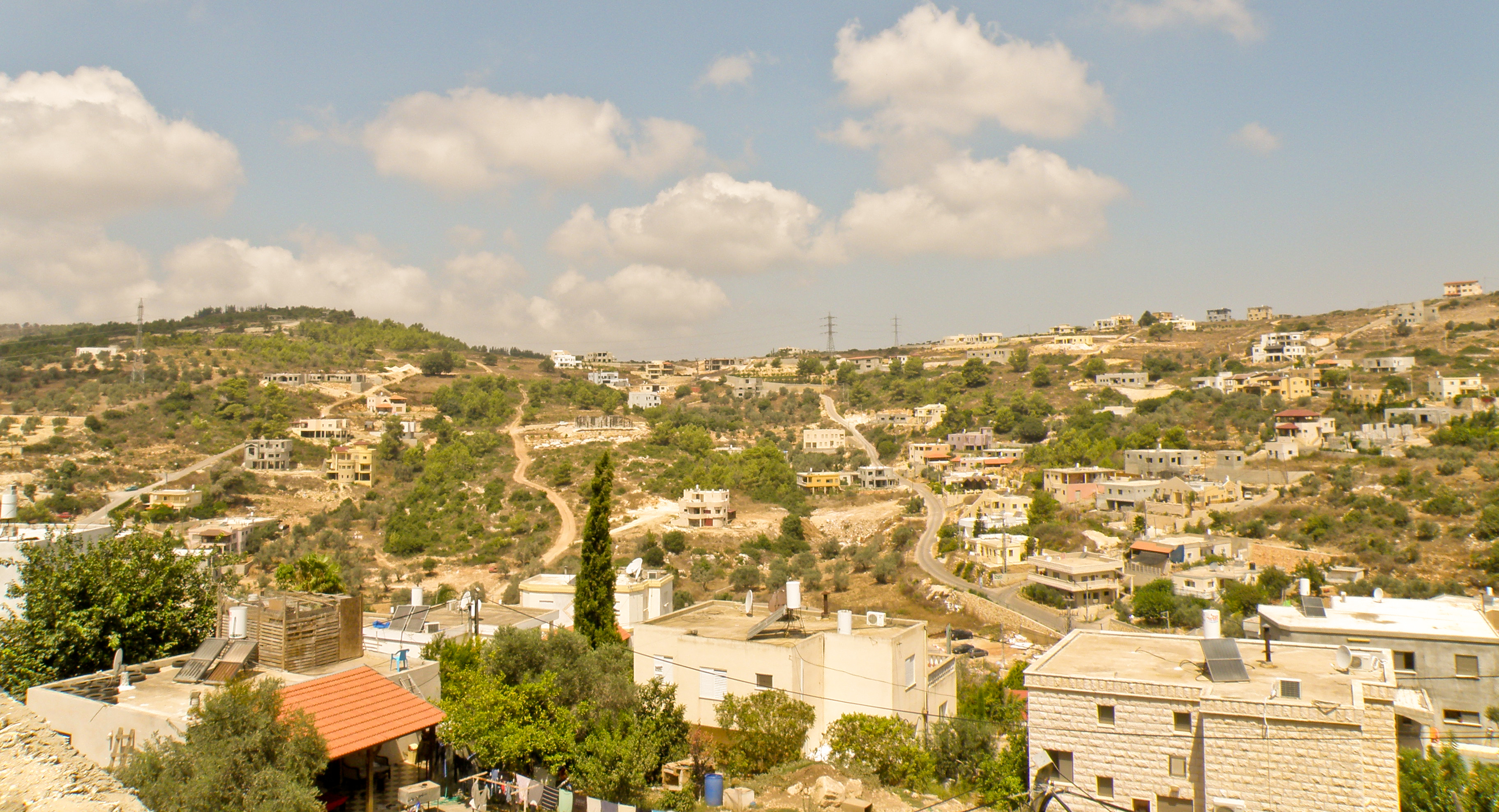 Daliyat al-Karmel | דאלית אל-כרמל Haifa